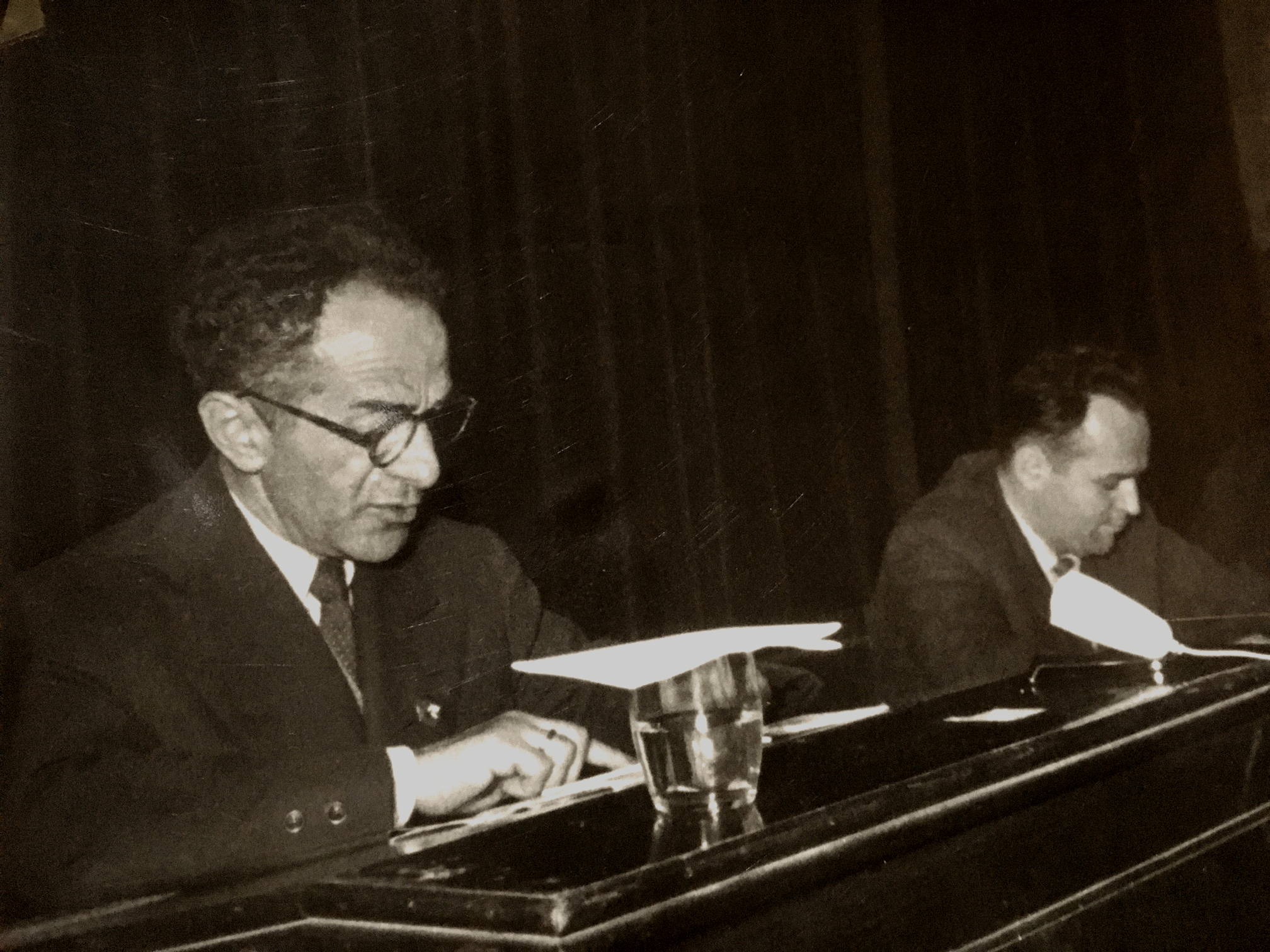 A photo taken early